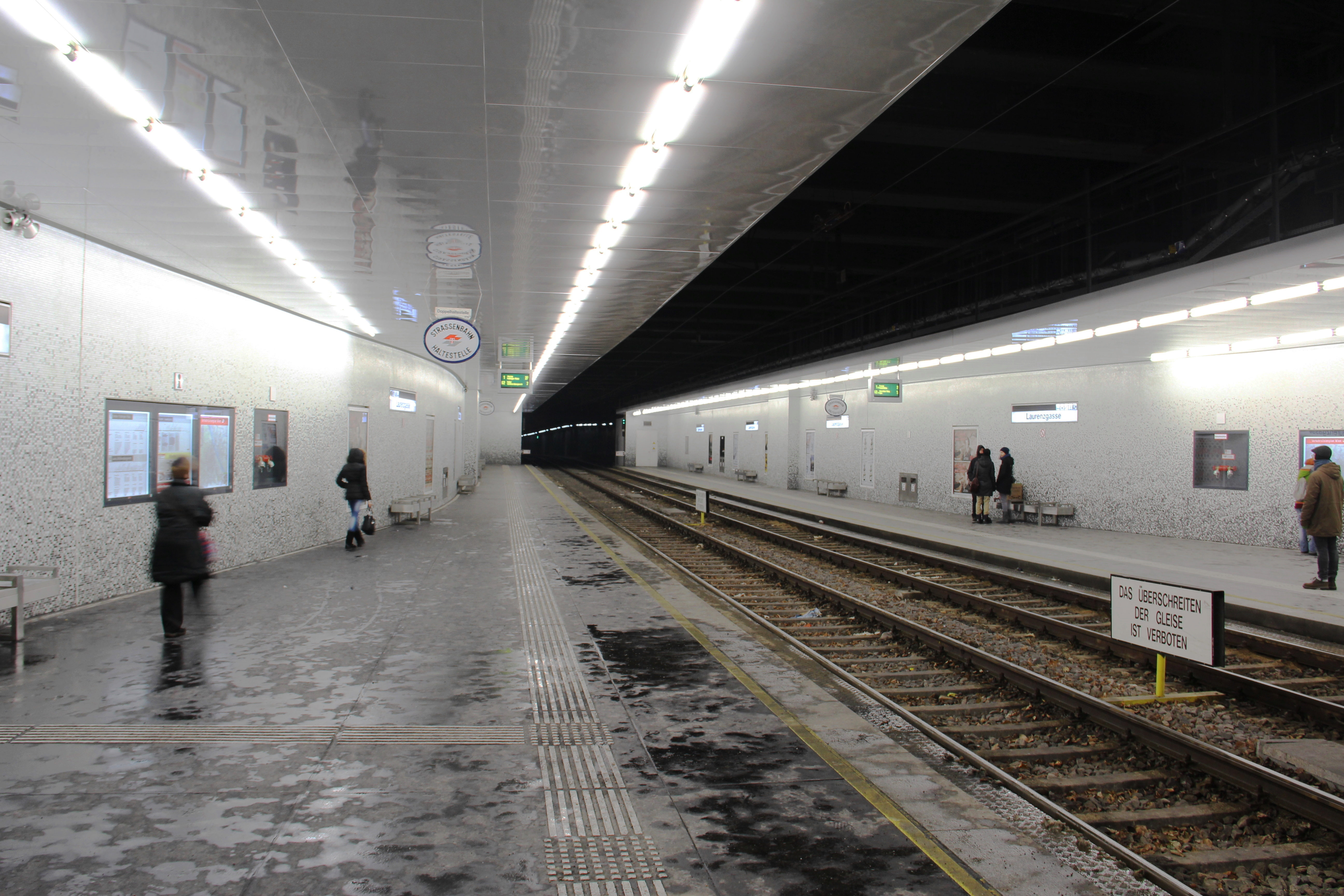 Die fertig renovierte Haltestelle Laurenzgasse